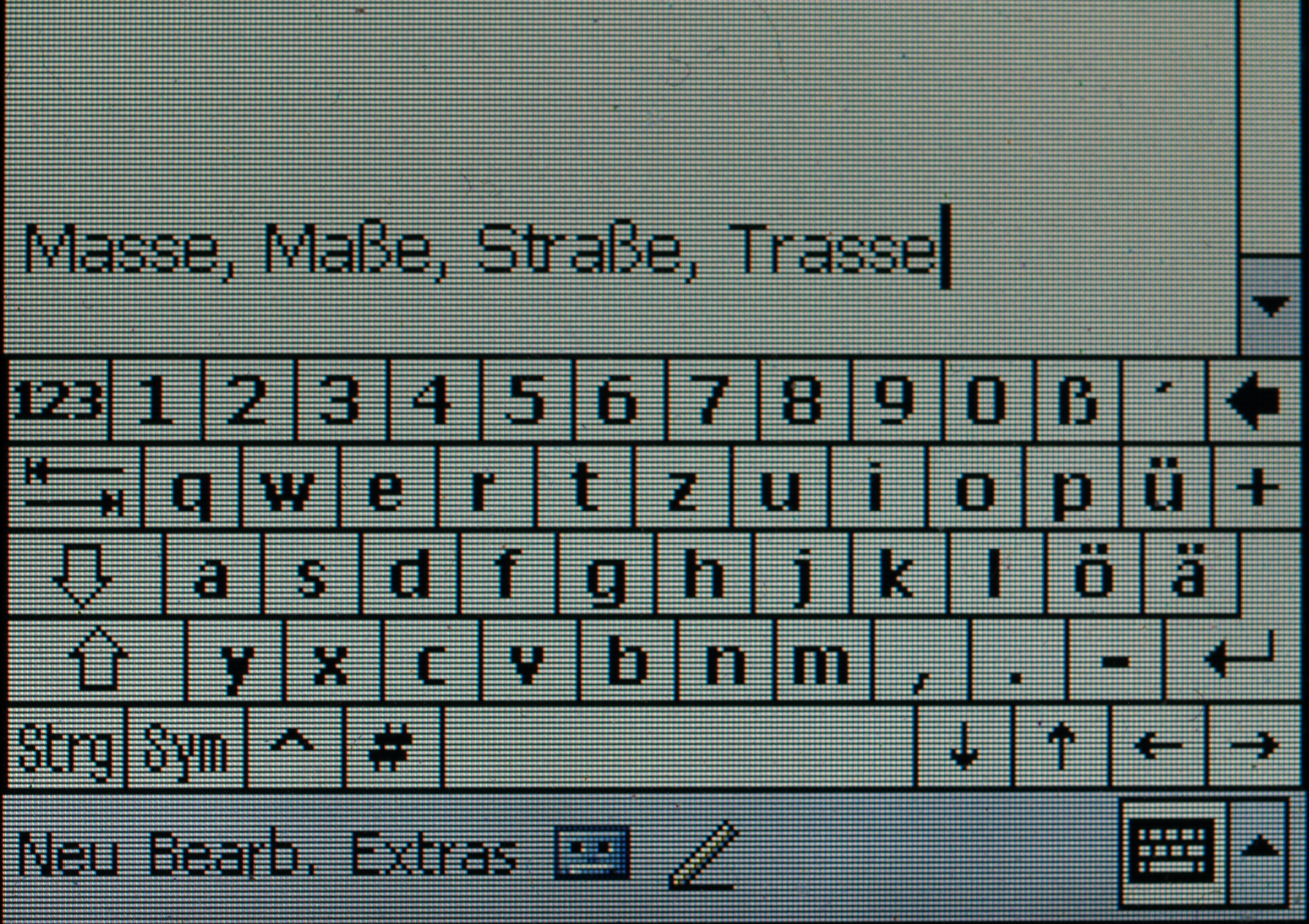 Virtual Keyboard on a pocket-PC, German version with a 'ß' key